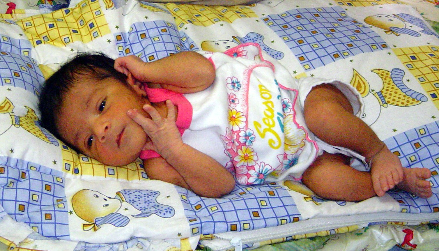 Baby